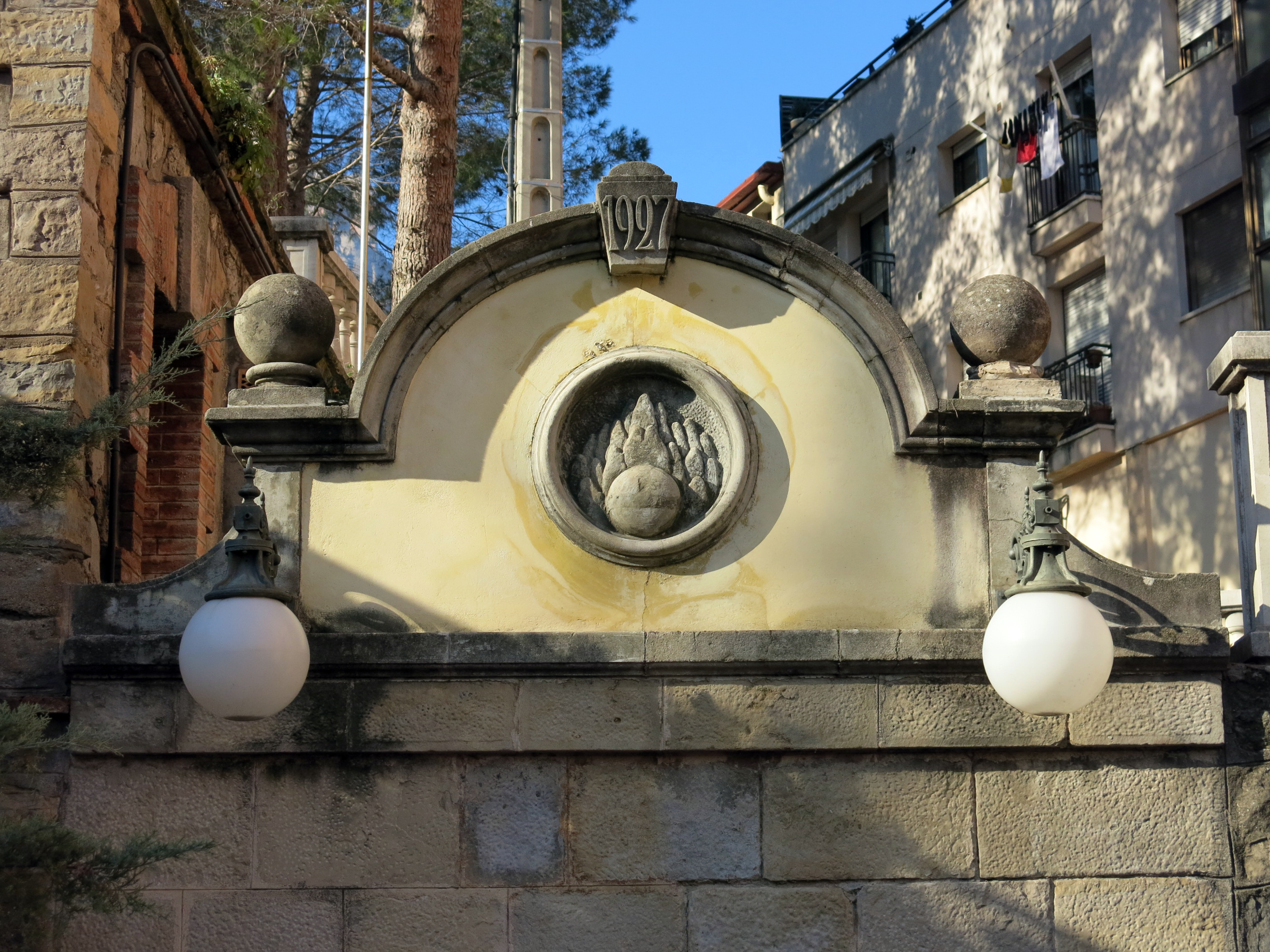 La Font Gran (Monistrol de Montserrat)